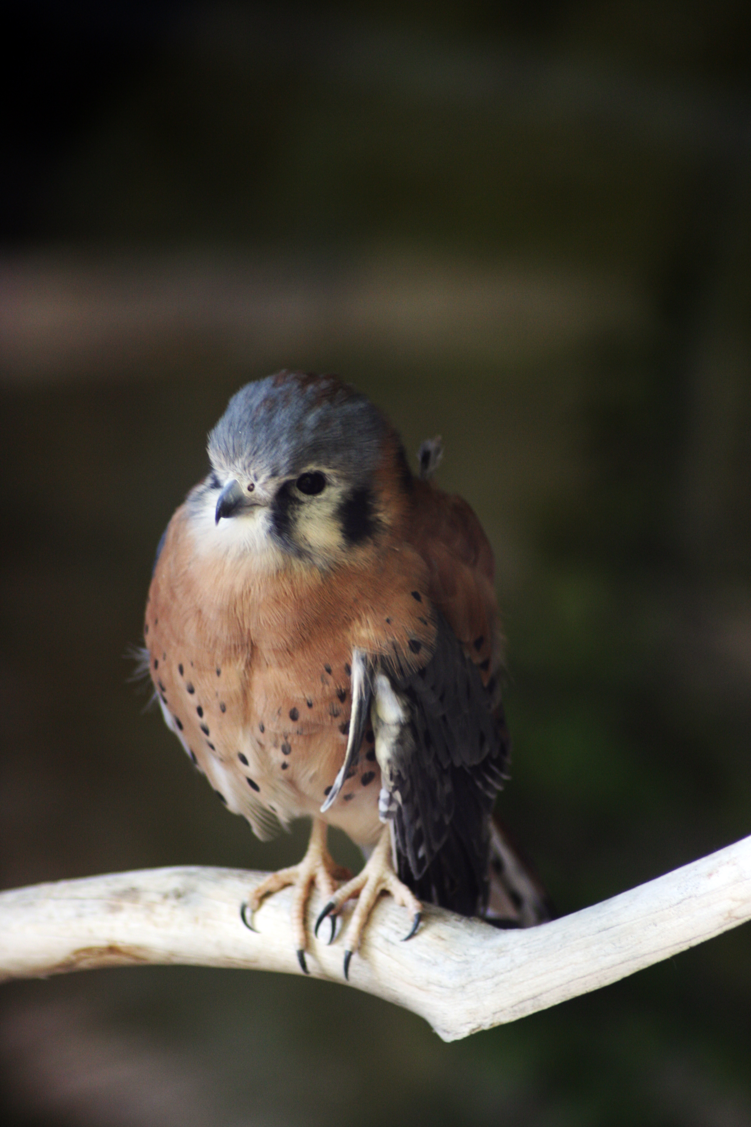 Falco sparverius Kestrel